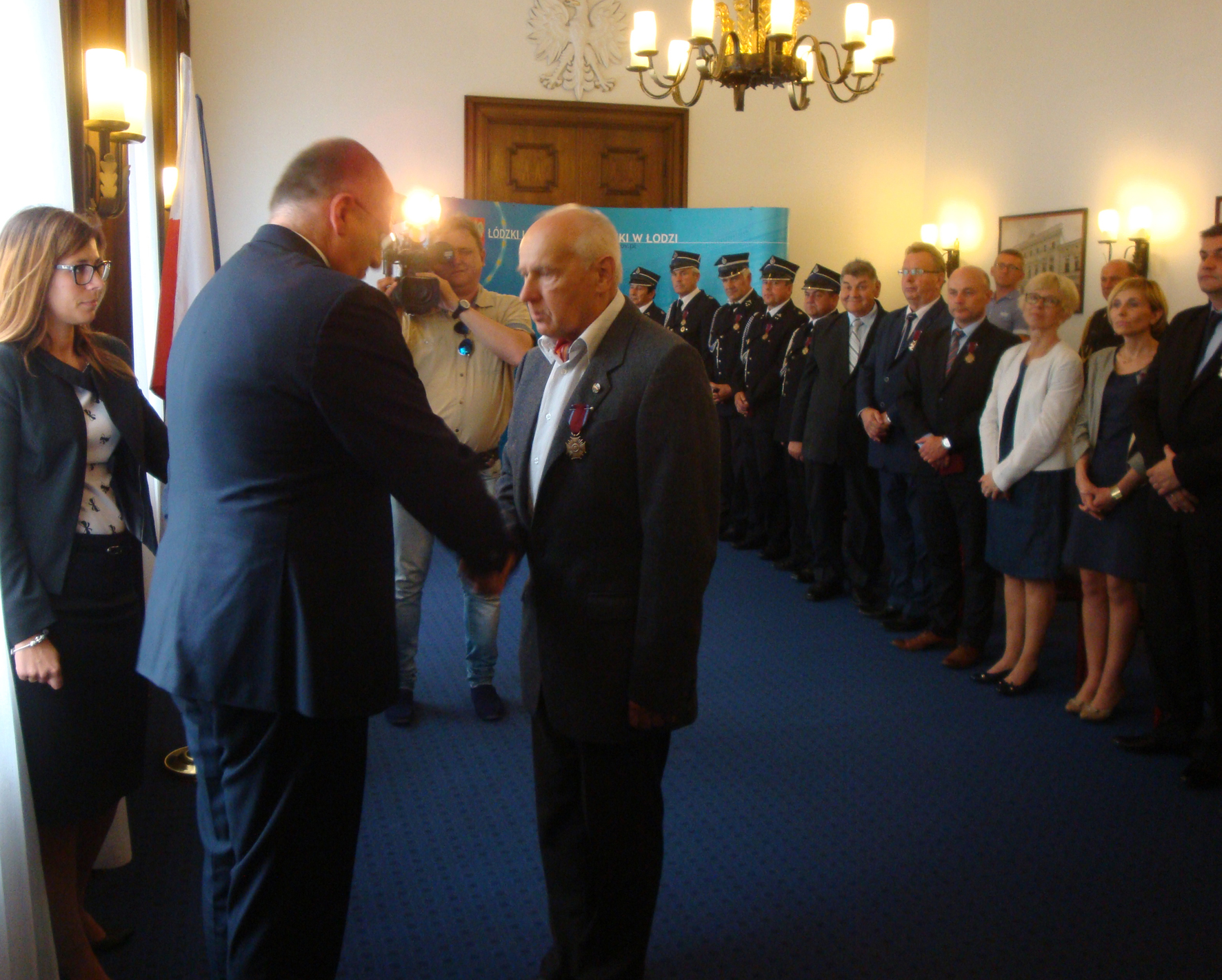 Odznaczeni łodzianie 28 czerwca 2016; Jan J. Zienkiewicz